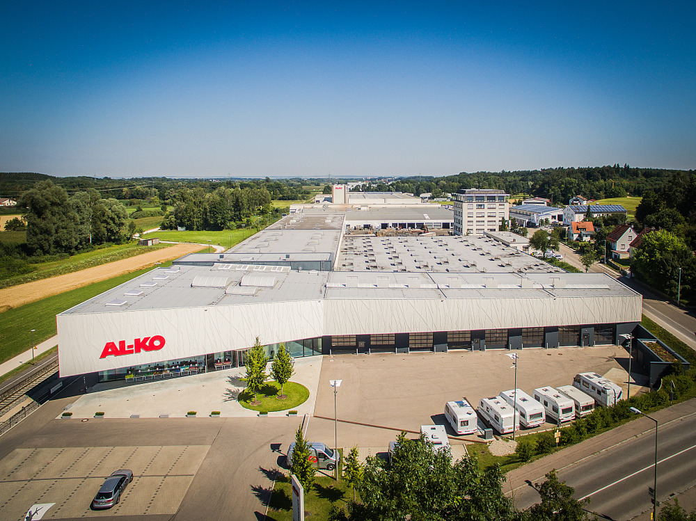 Das Foto zeigt den Hauptsitz der AL-KO Fahrzeugtechnik in Kleinkötz. Im Vordergrund ist das Kundencenter zu sehen.